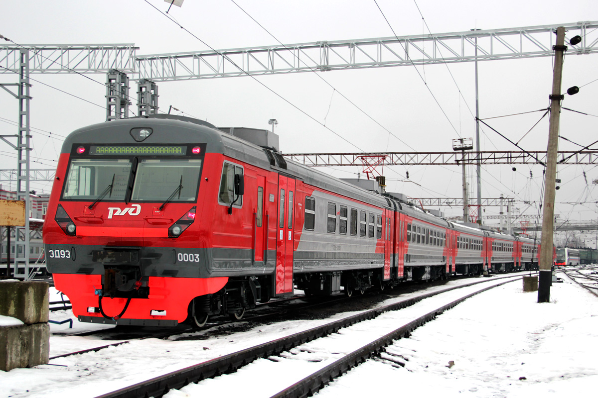 Электропоезд ЭД9Э-0003